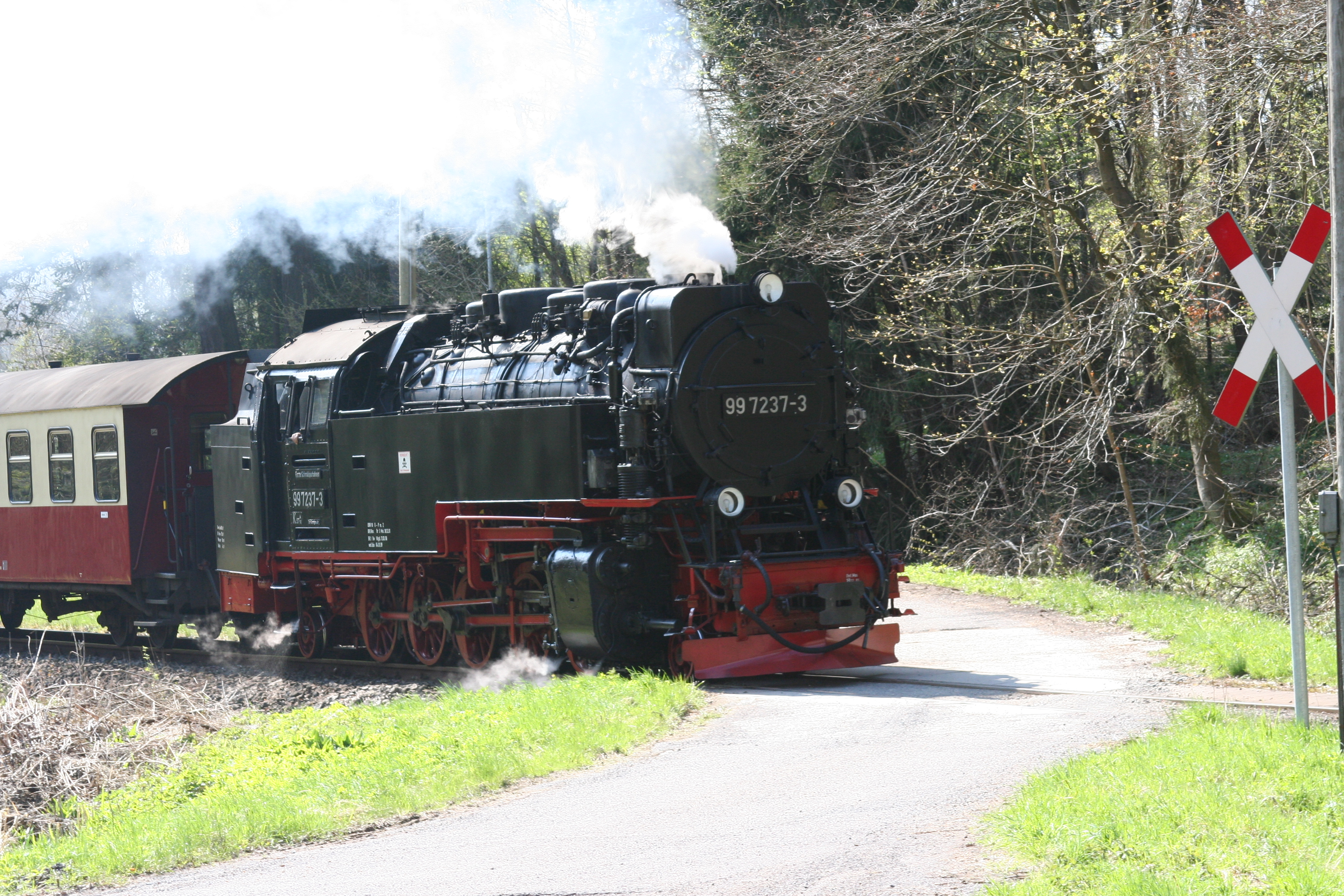 Stoomlok 99 7237-3 van de Harzer Schmalspurbahnen, in de richting van Hasselfelde bij Albrechtshaus.